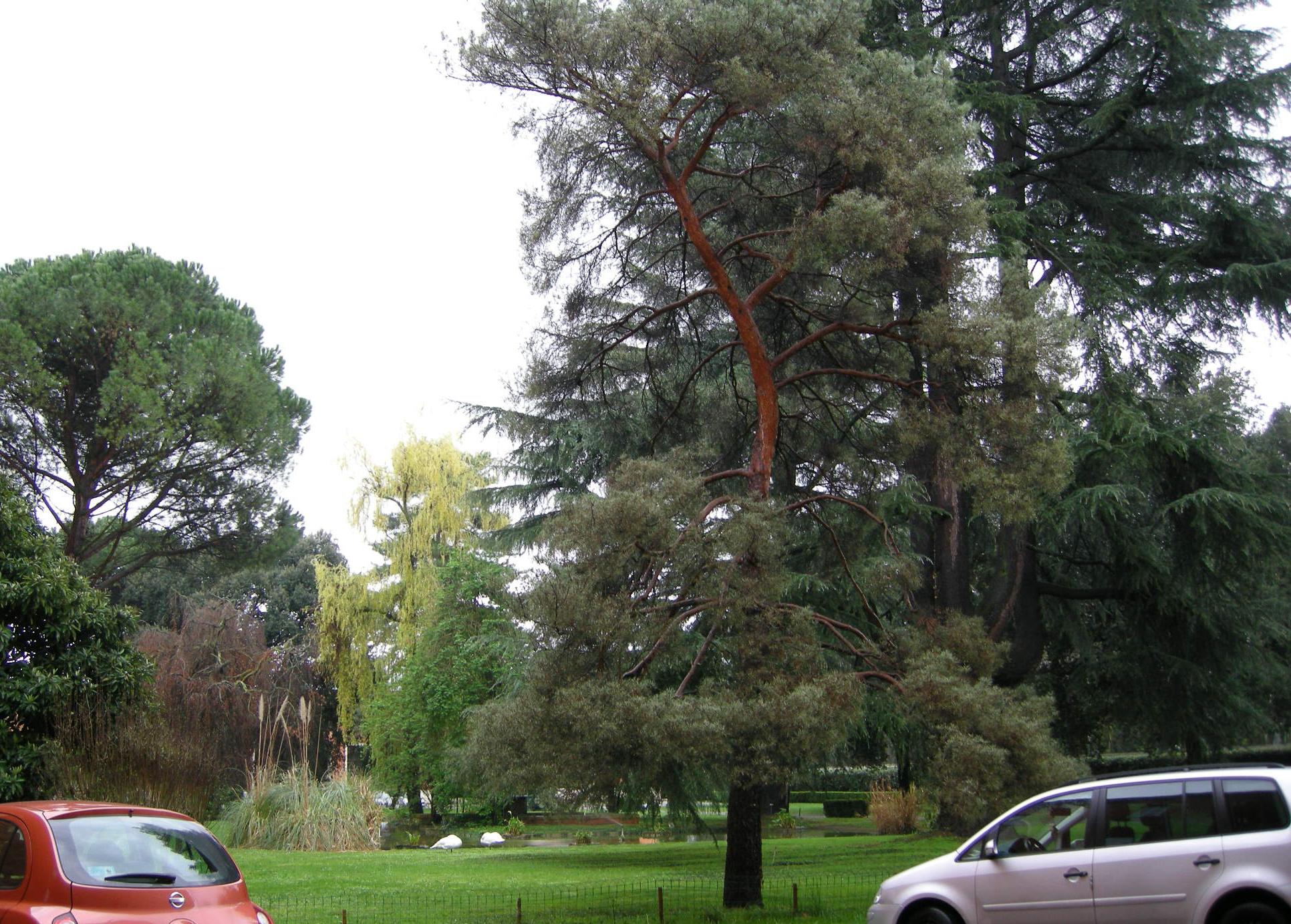 Arboreto sperimentale firenze